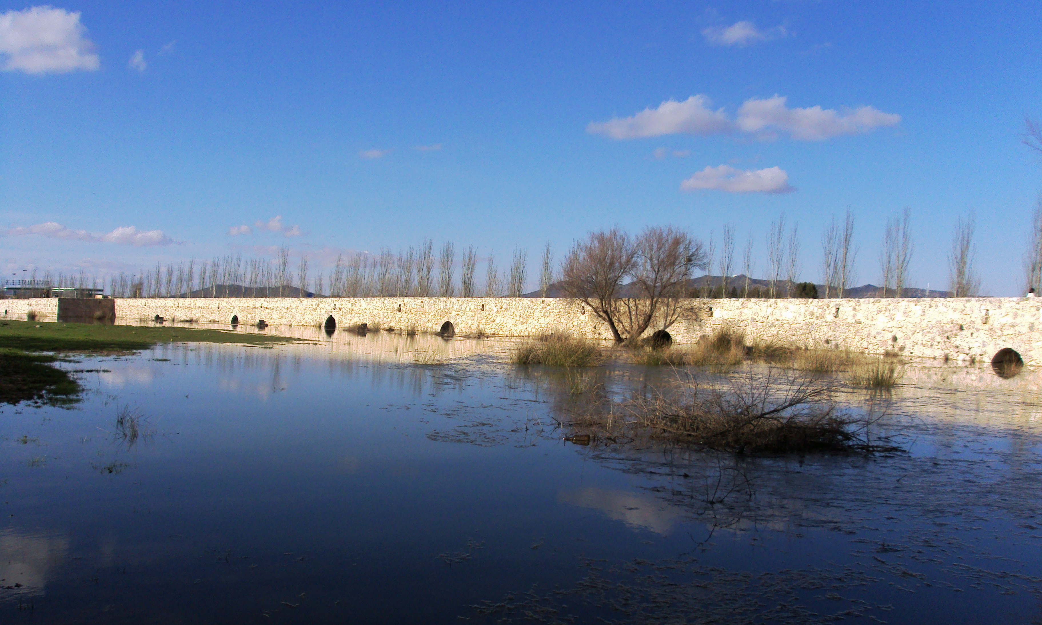 Rio Ciguela a su paso por Villarta de San Juan (Ciudad Real) en el cuál se ve el cauce lleno en su totalidad pasando sobre la calzada romana de 40 ojos.